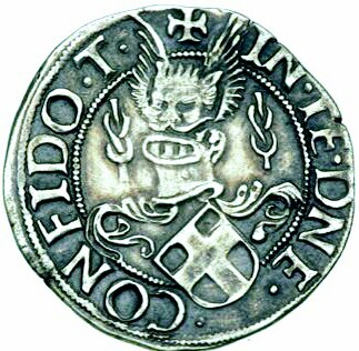 1/2 Testone aus der Regierungszeit von Filiberto II., 1497 bis 1504 8. Herzog von Savoyen, der 1501 Margarete von Österreich heiratete, die Tochter Kaiser Maximilians. Dargestellt Stammwappen Savoyen. Die Übersetzung von " + IN TE DNE CONFIDO T" bedeutet "Auf Dich, Herr, vertraue ich" "T" für Prägeort Turin.